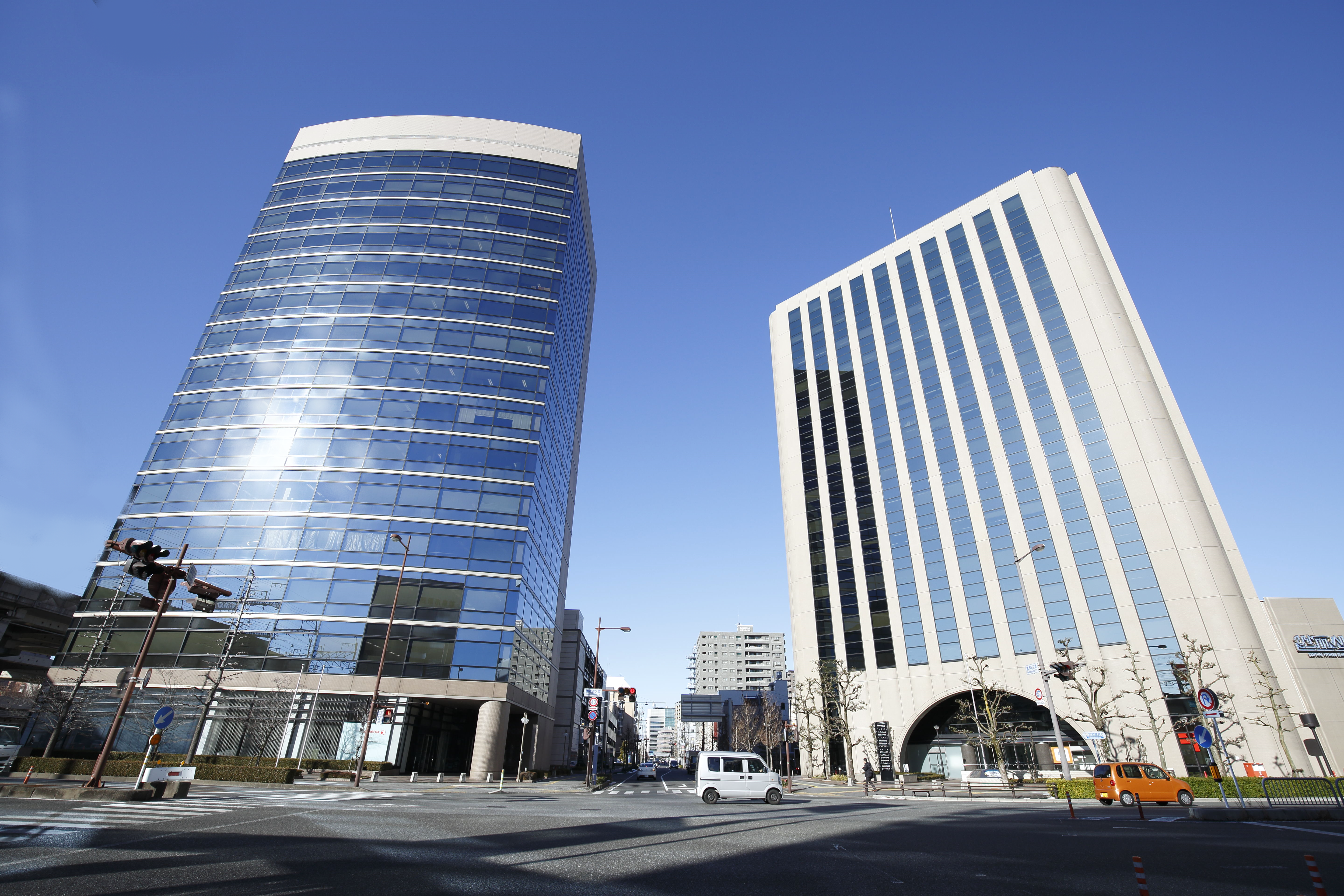 濃飛倉庫運輸の本社